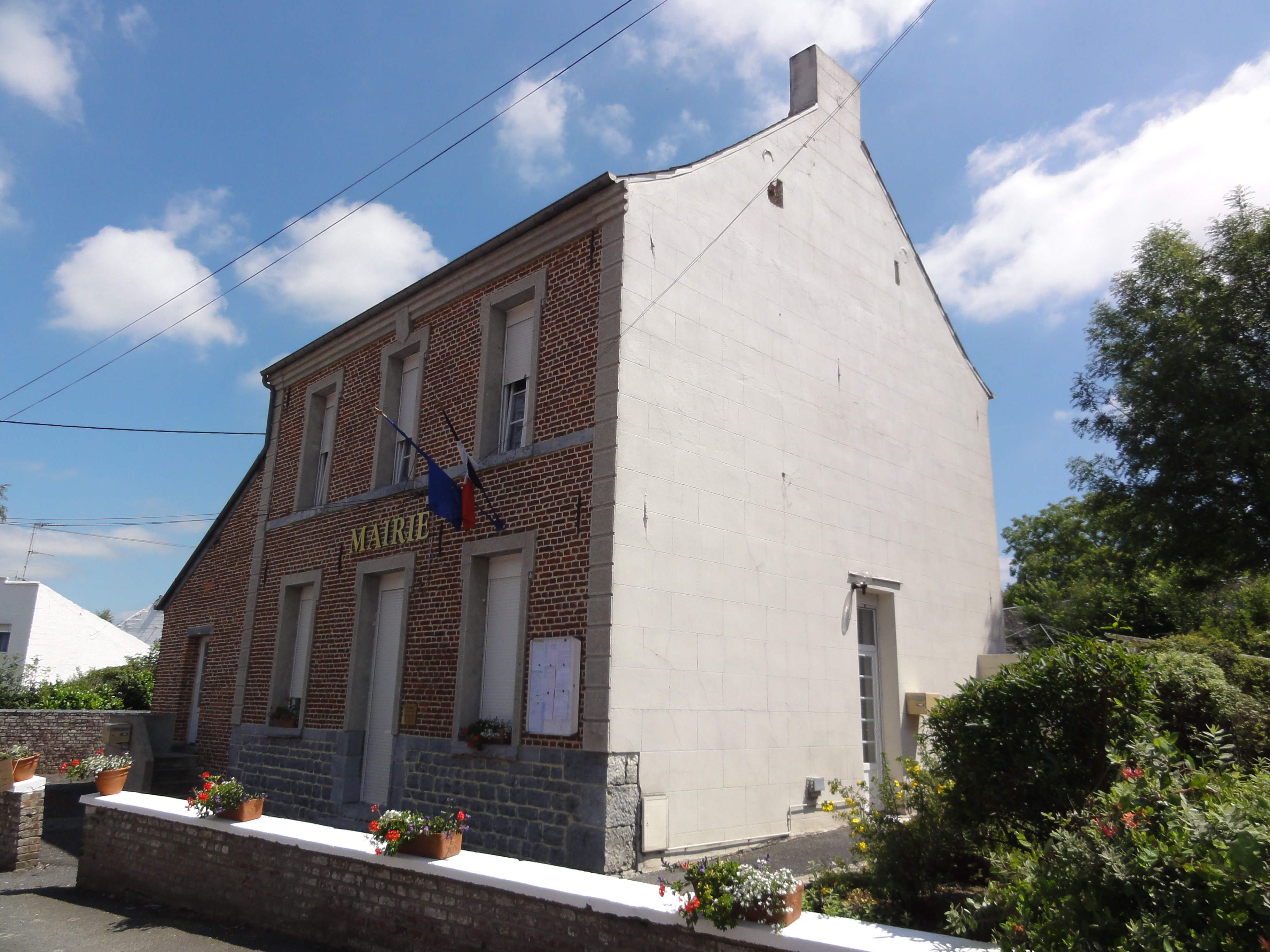 Bersillies (Nord, Fr) mairie.